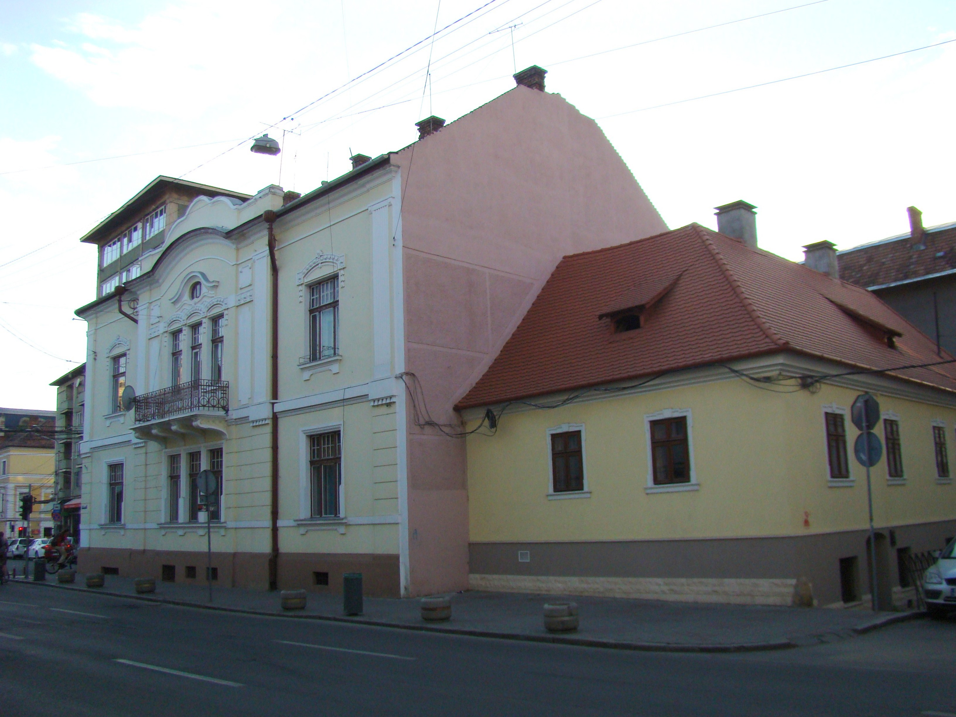 Clădire monument istoric, str. Napoca nr.18